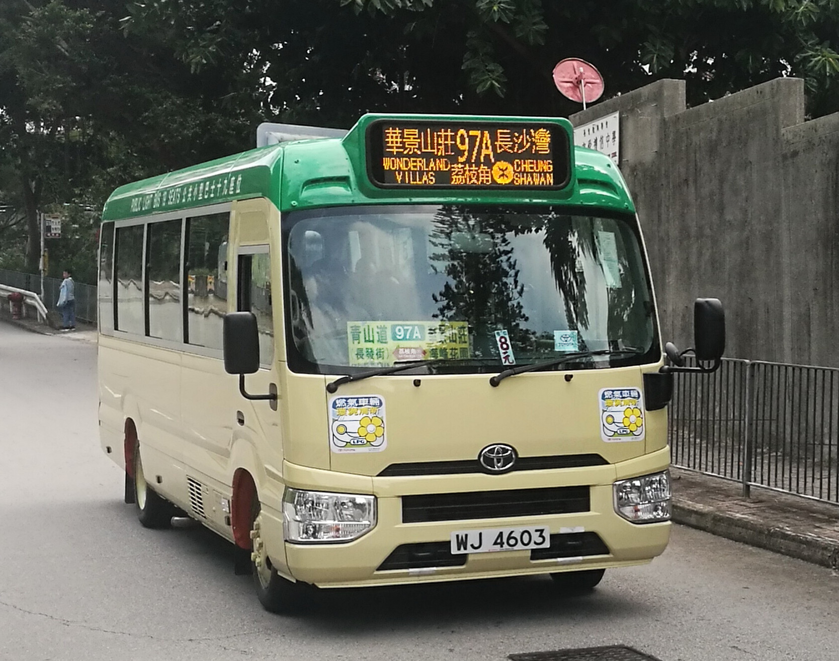 小巴WJ4603的照片